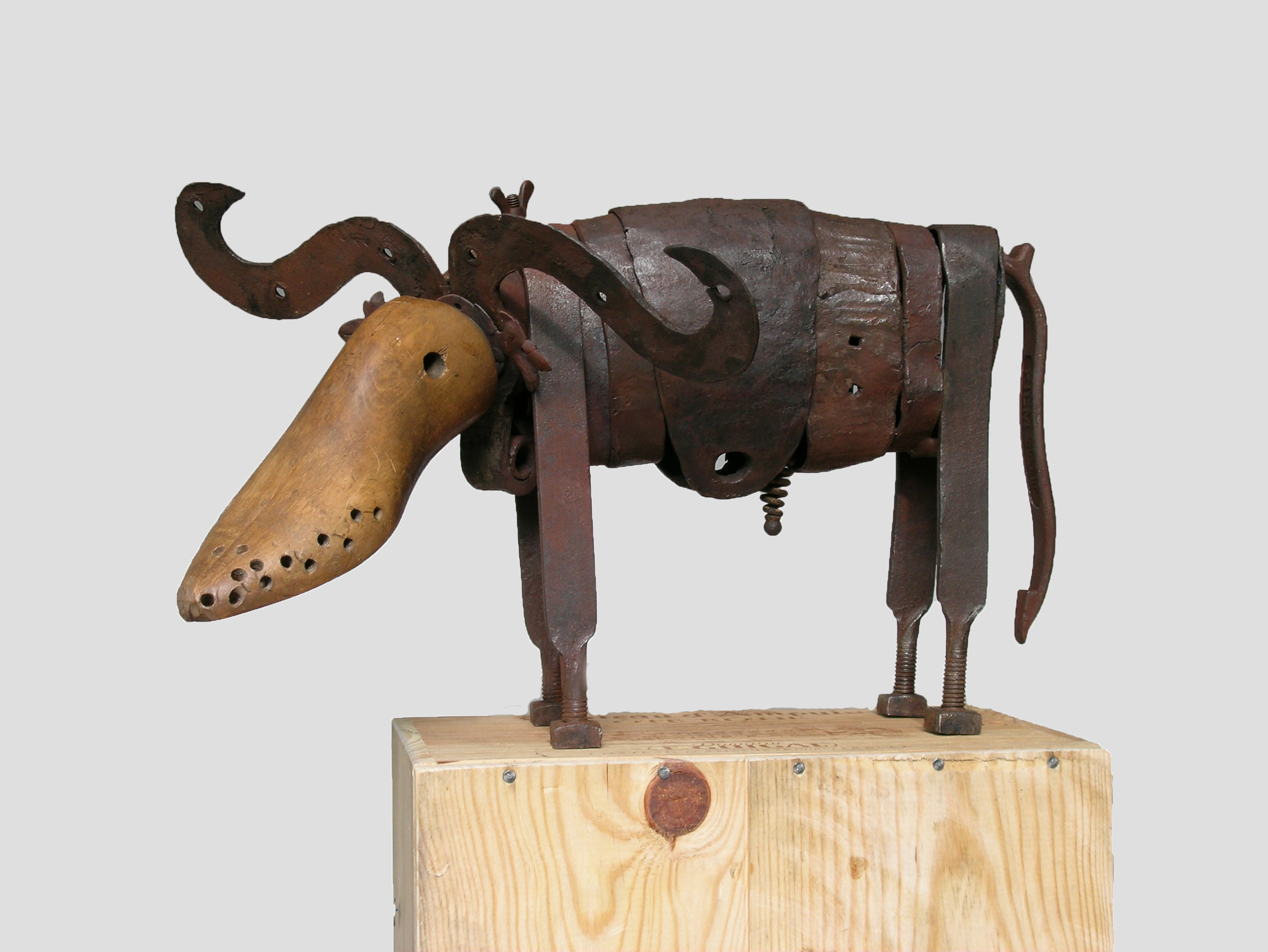 Object trouvé von Josef Caminada